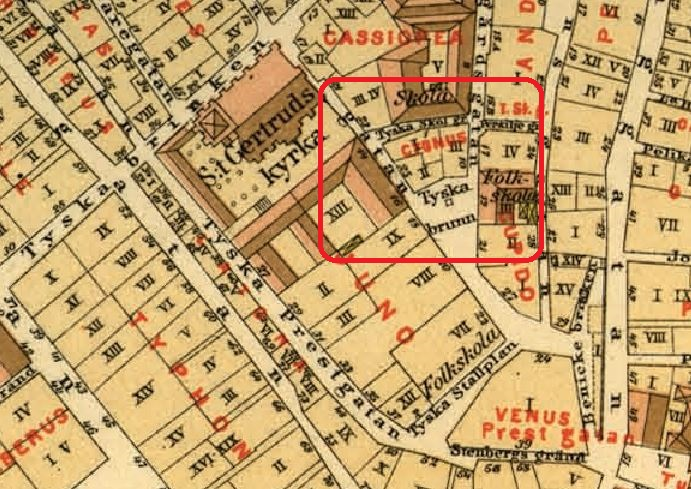 Kvarteret Cygnus på Lundgrens karta över Stockholm år 1885